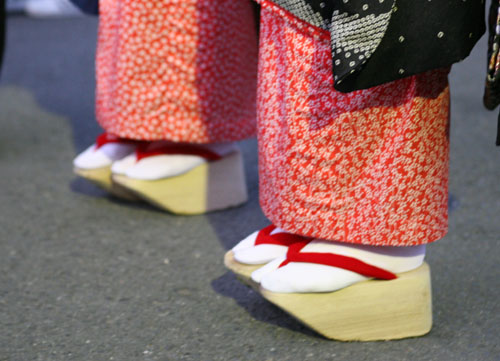 Maiko in Kyoto wearing Okobo